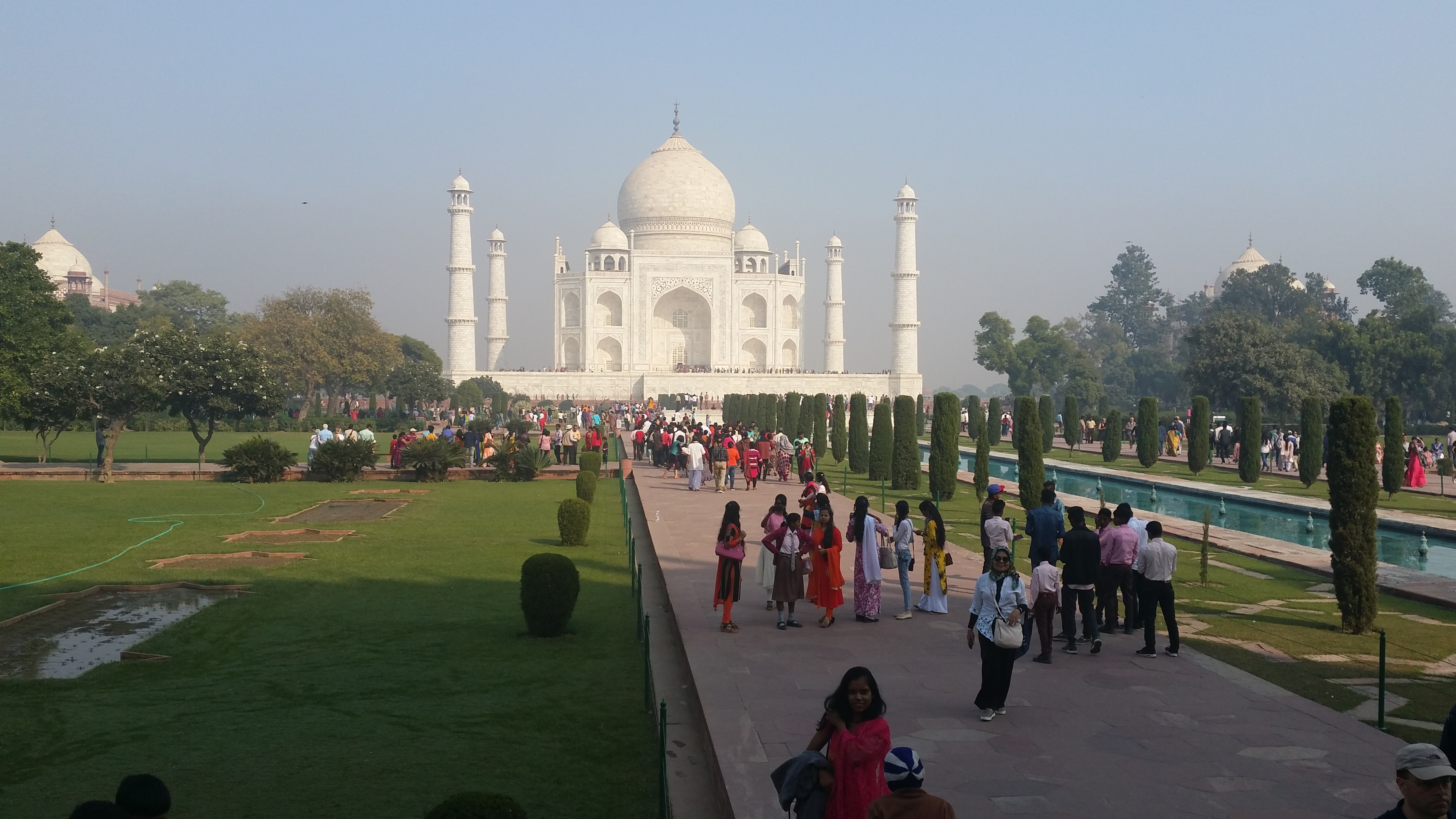 Taj Mahal in Agra